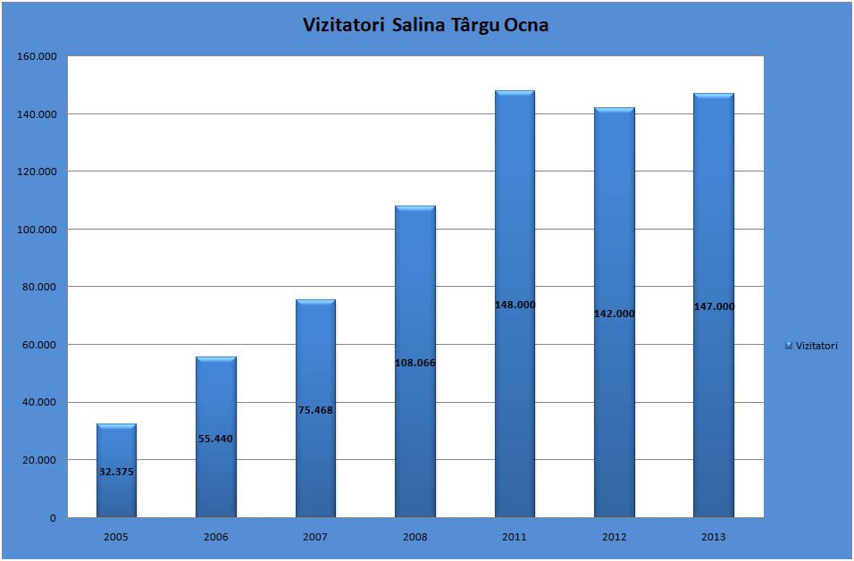 Vizitatori Salina Târgu Ocna în perioadele 2005-2008 şi 2011-2013, după Bianca Radu (asistent universitar) -Turismul cultural ca mijloc de valorificare a patrimoniului industrial în vederea regenerării economice a fostelor zone miniere Revista Transilvană de Științe Administrative, Facultatea de Științe Politice, Administrative și ale Comunicării, Universitatea Babeș-Bolyai, Cluj-Napoca, 2014, pag. 150